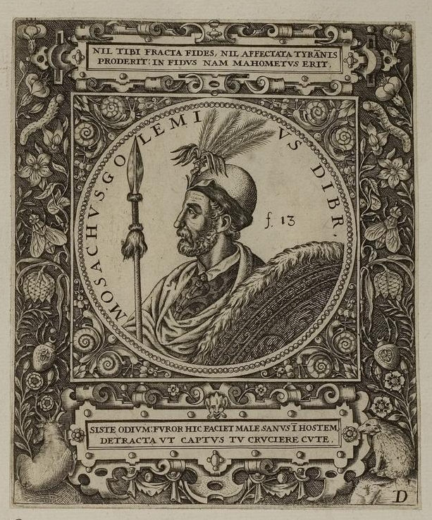 Grafik aus dem Klebeband Nr. 1 der Fürstlich Waldeckschen Hofbibliothek Arolsen Illustration aus: Georg Greblinger: Wahre Abbildungen der Türckischen Kayser vnd Persischen Fürsten / so wol auch anderer Helden und Heldinnen von dem Osman / biß auf den andern Mahomet. Johann Ammon, Frankfurt 1648 Motiv: "Mosachus Golemius Dibr" (Moisi Arianit Golemi)